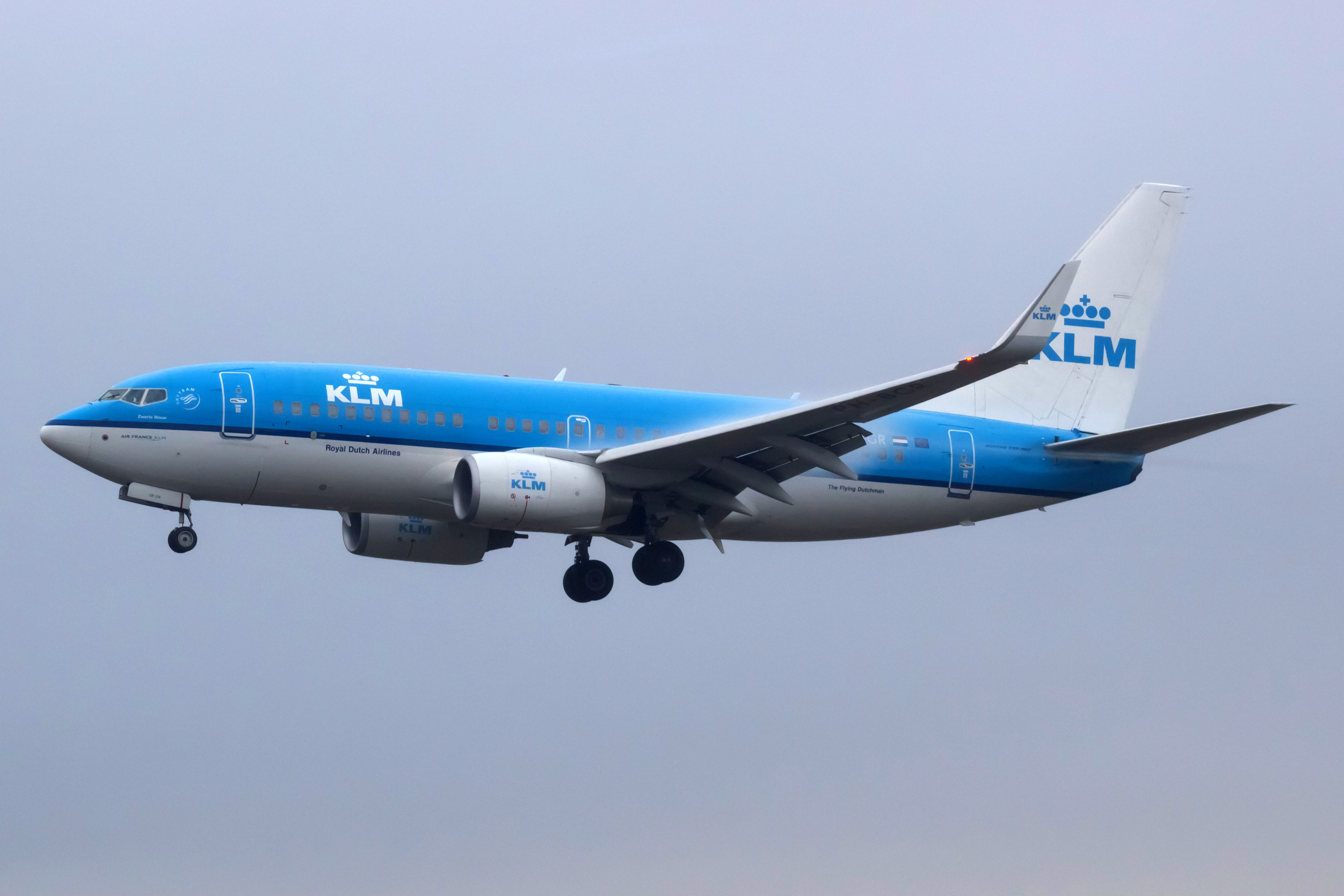 Boeing 737 de KLM aterrando no aeroporto de Oslo, Gardermoen.